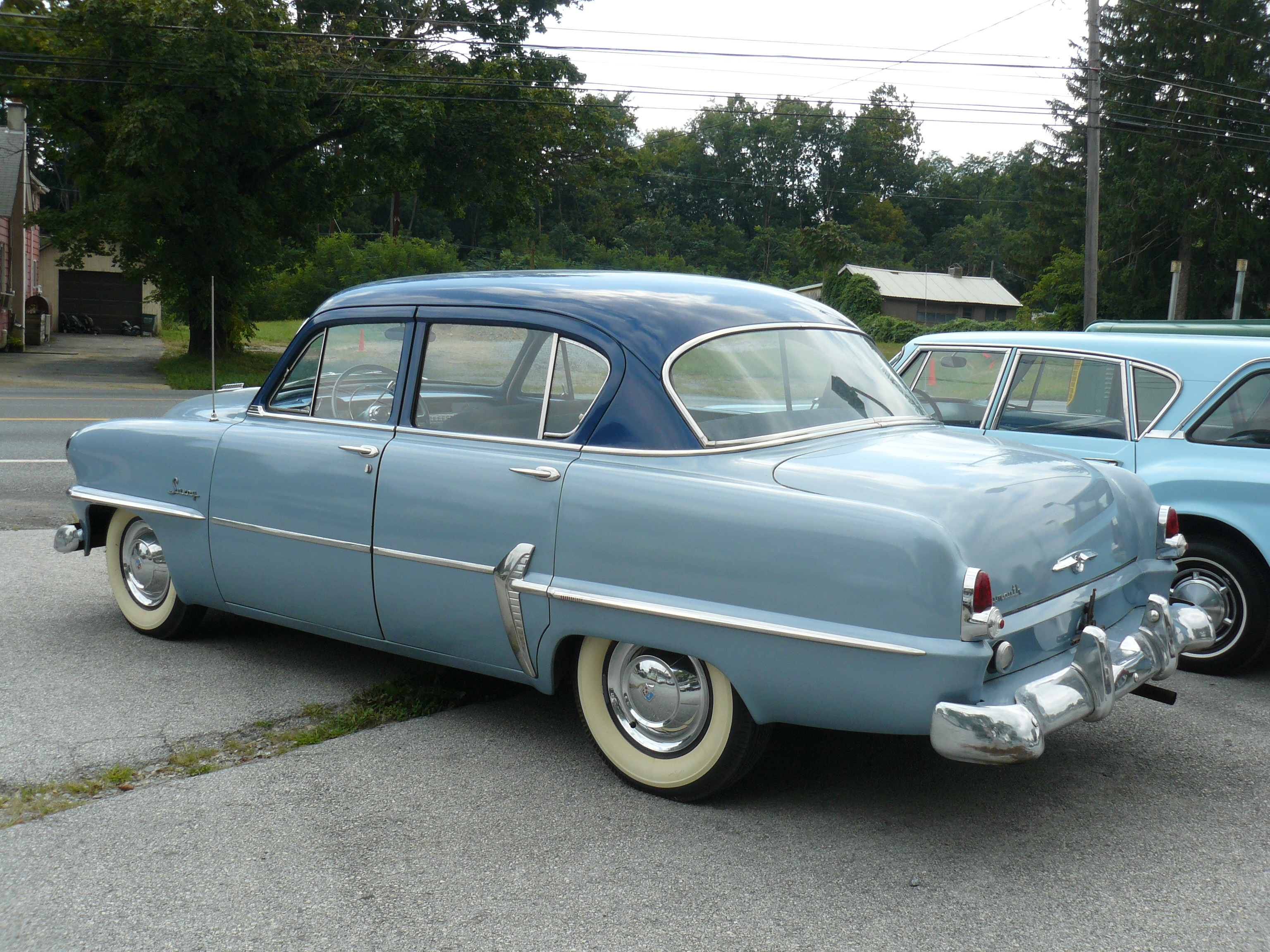 Lincoln Highway 2013